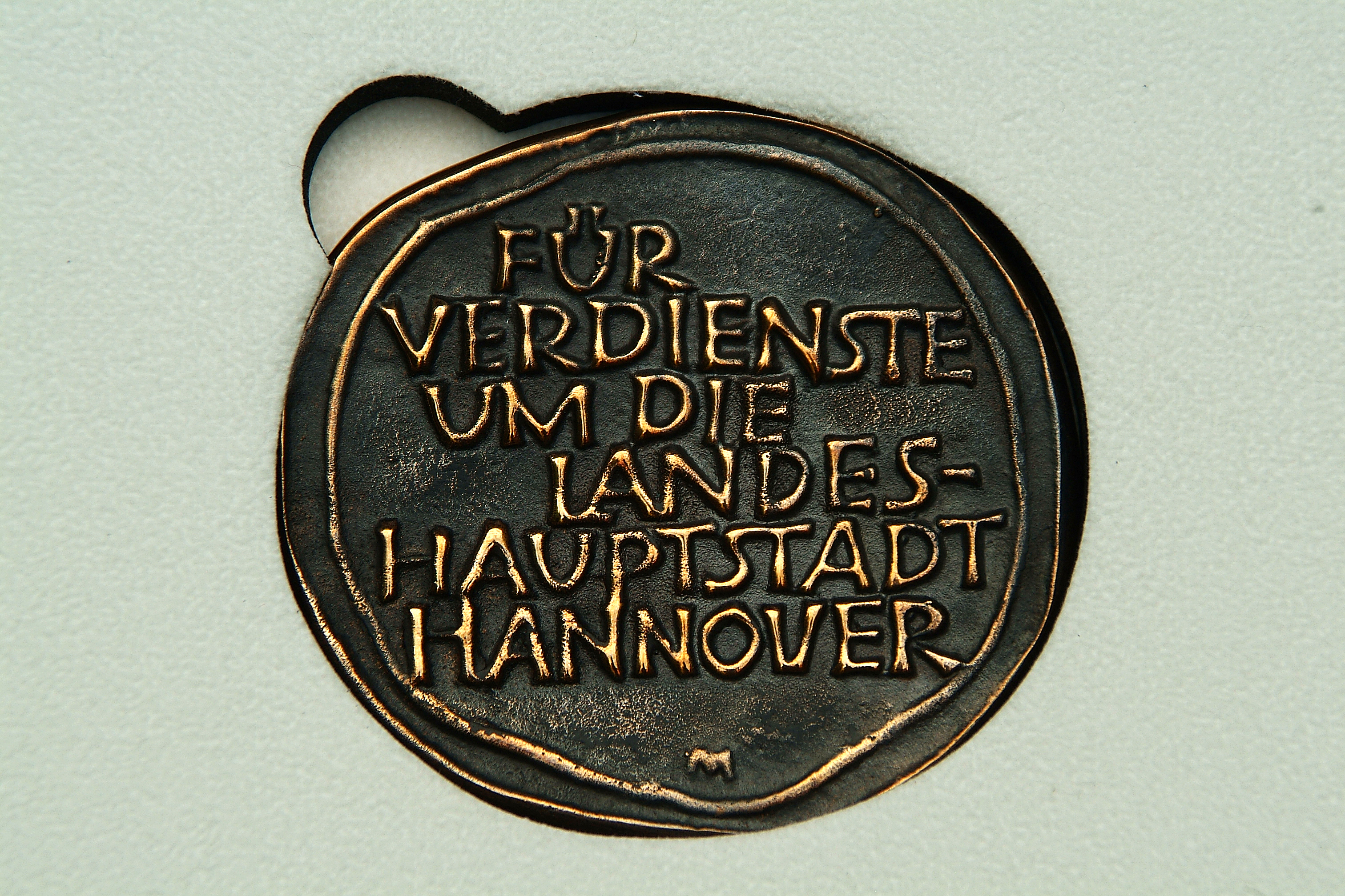 "Für Verdienste um die Landeshauptstadt Hannover" ehrte die Stadt die Künstlerin Ulrike Enders durch die Verleihung der Stadtplakette Hannover; diese Seite zeigt die Künstlersignatur "M" ...